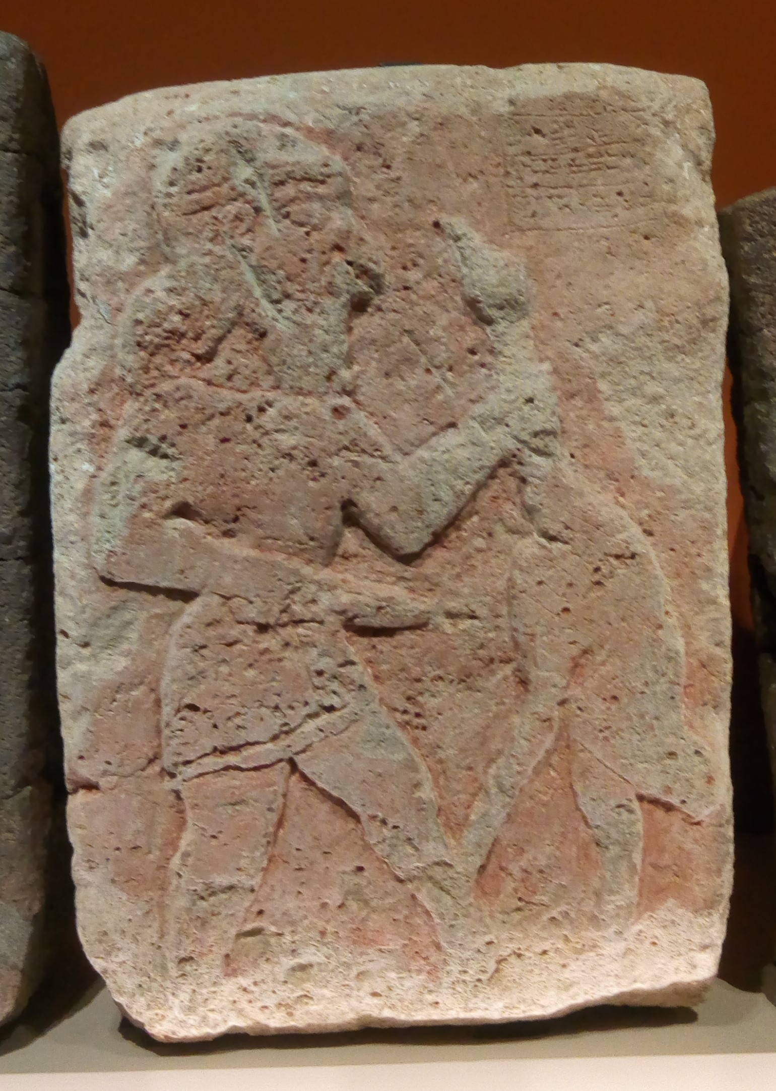 Orthostate en calcaire peint en rouge représentant un homme tuant une oie. Disposé à l'origine sur la façade du "temple-palais" du roi Kapara de Guzana, site archéologique de Tell Halaf. IXe s. av. J.-C. Sur orthostate en calcaire. Exposé au Musée du Louvre en 2019 dans le cadre de l'exposition "Royaumes oubliés". Collections du Pergamon Museum de Berlin.